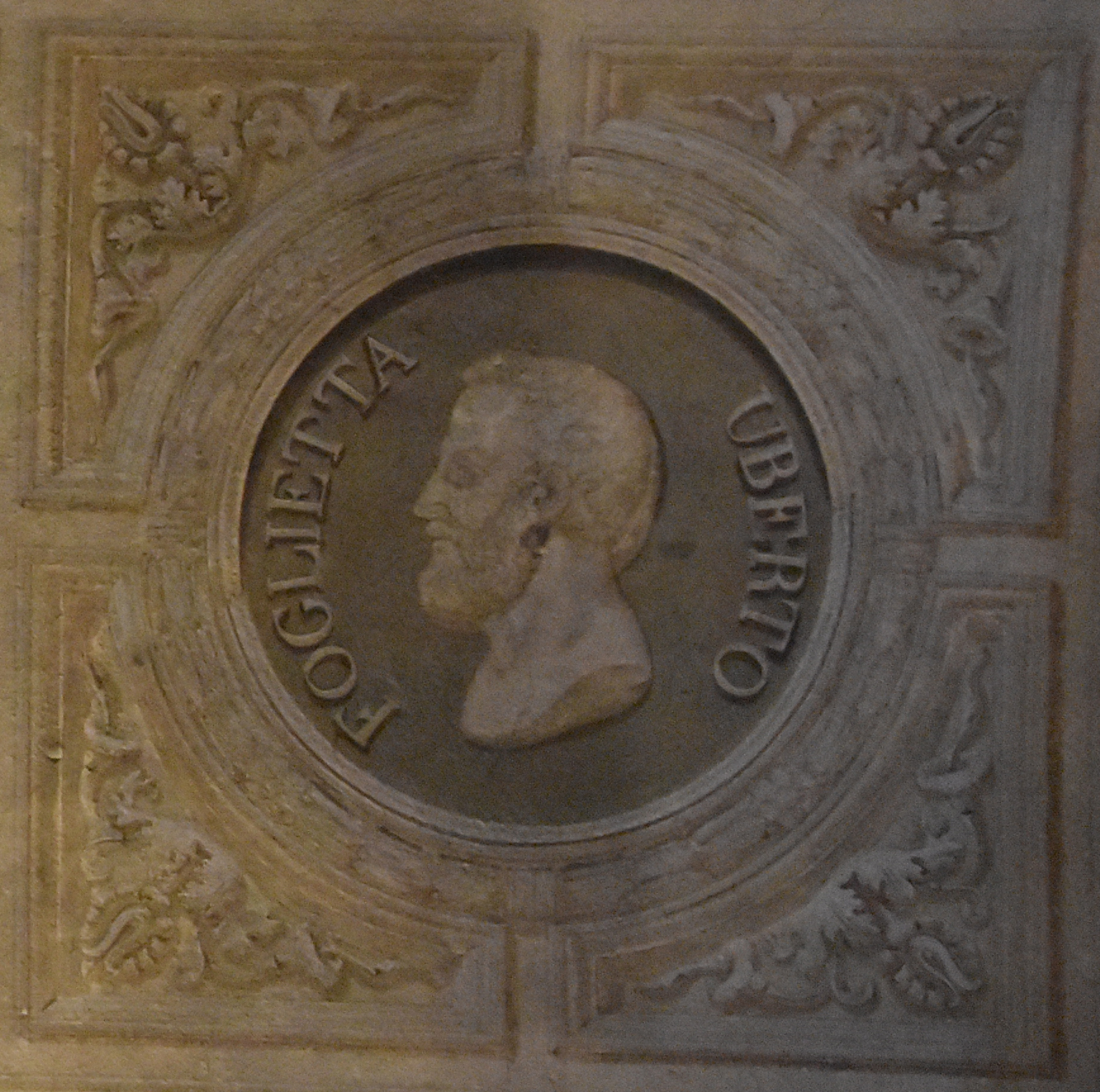 La Biblioteca Reale di Torino, ritratto di Oberto Foglietta.